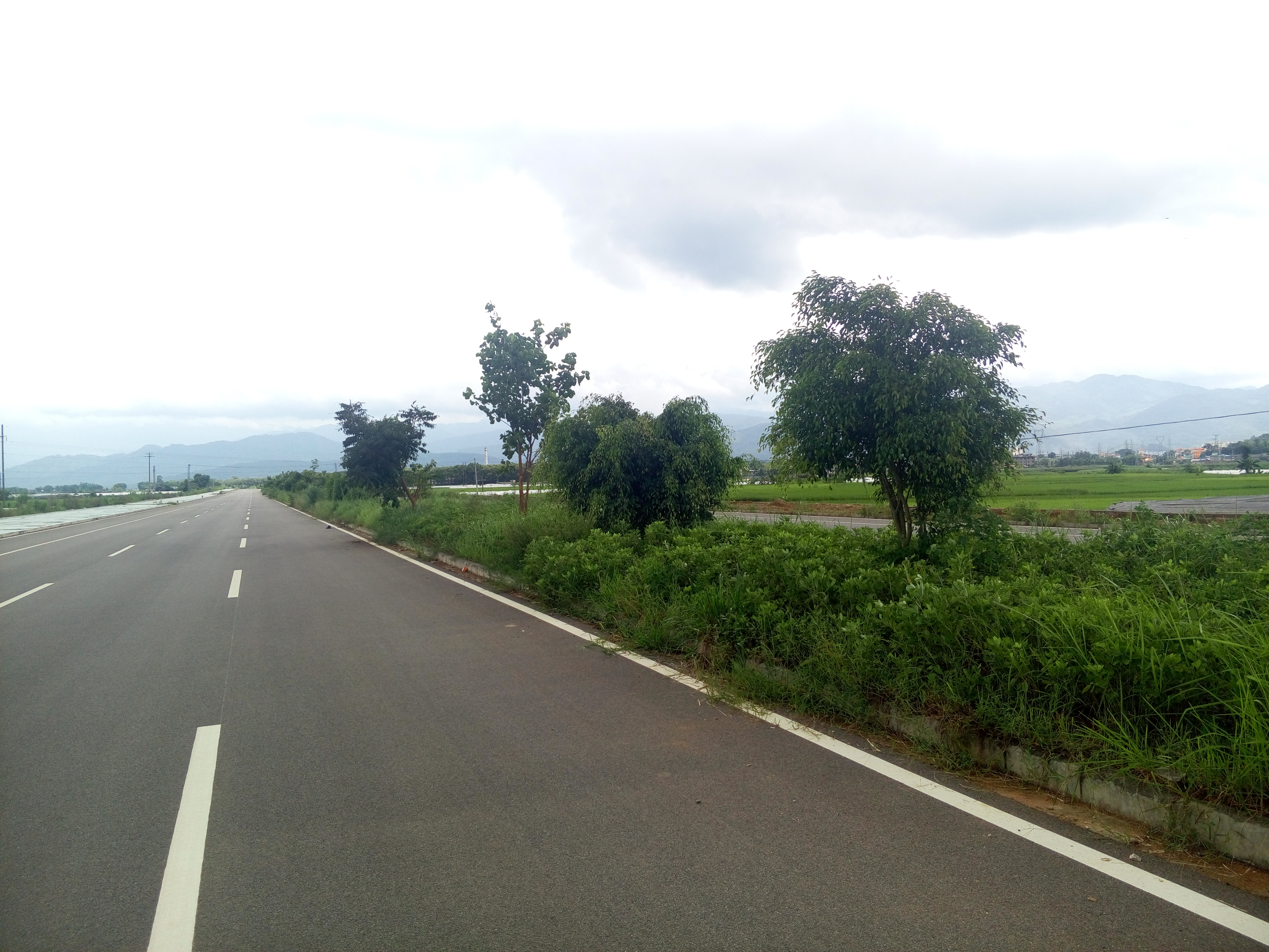 风平镇附近的芒瑞大道